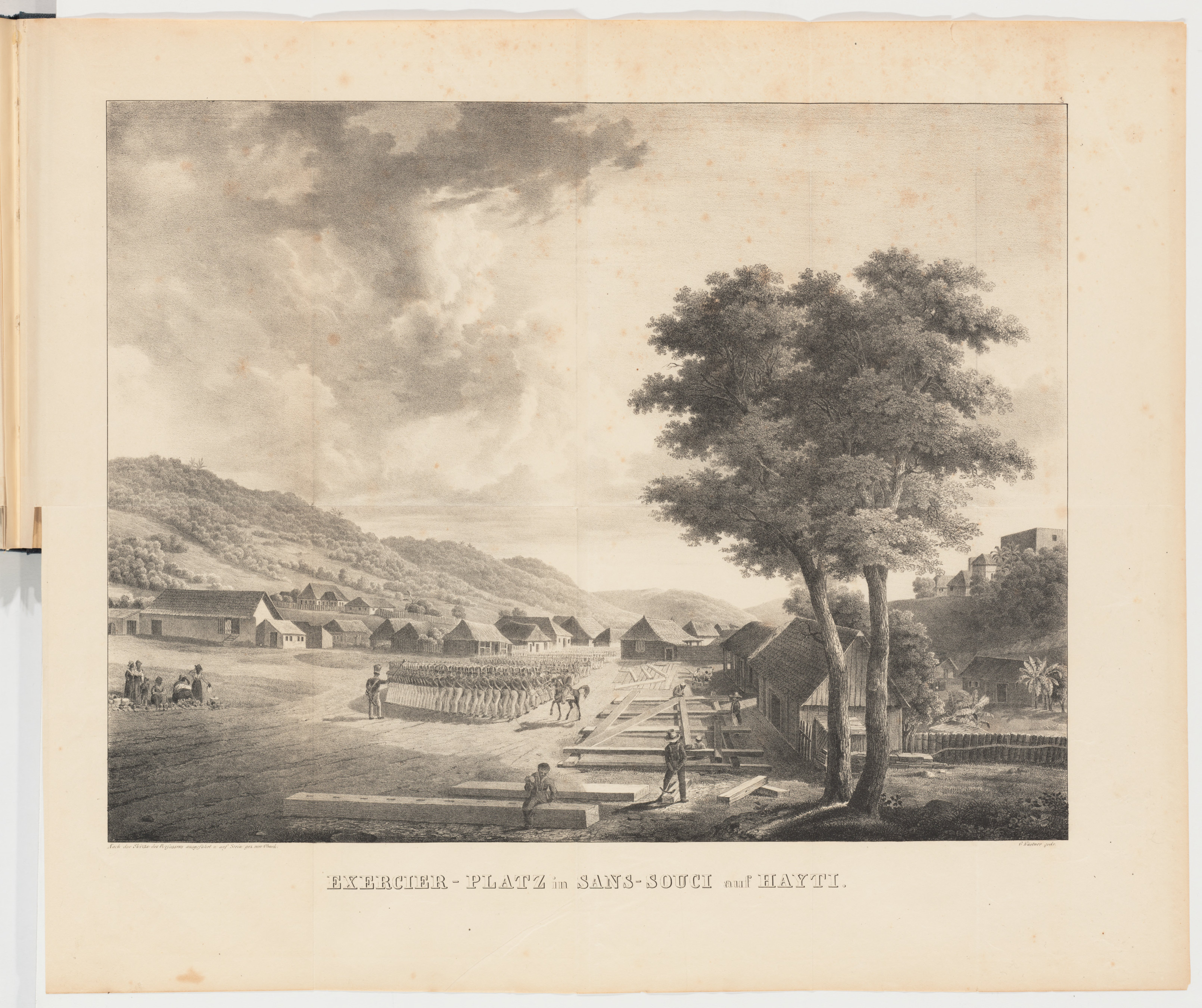 Exercier-Platz in Sans-Souci auf Hayti. Illustration aus Naturhistorische Reise nach der westindischen Insel Hayti Brasiliensium von Carl Ritter